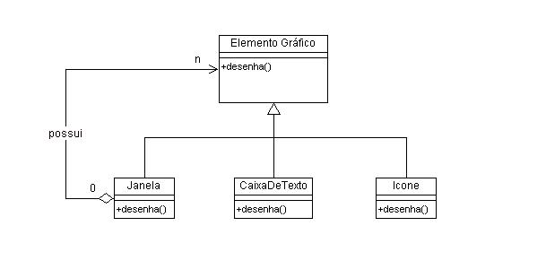 Hierarquia de Classes que utiliza o padrão de projeto Composite.